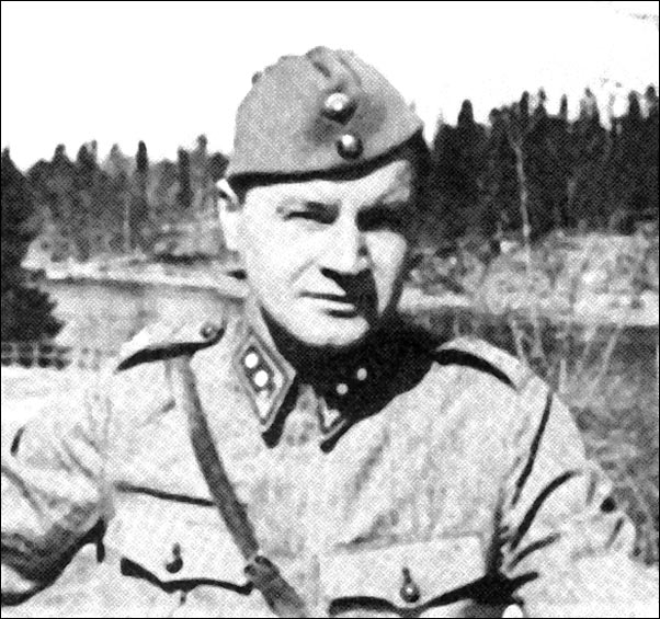 Erkki Tiesmaa, suomalainen sanoittaja